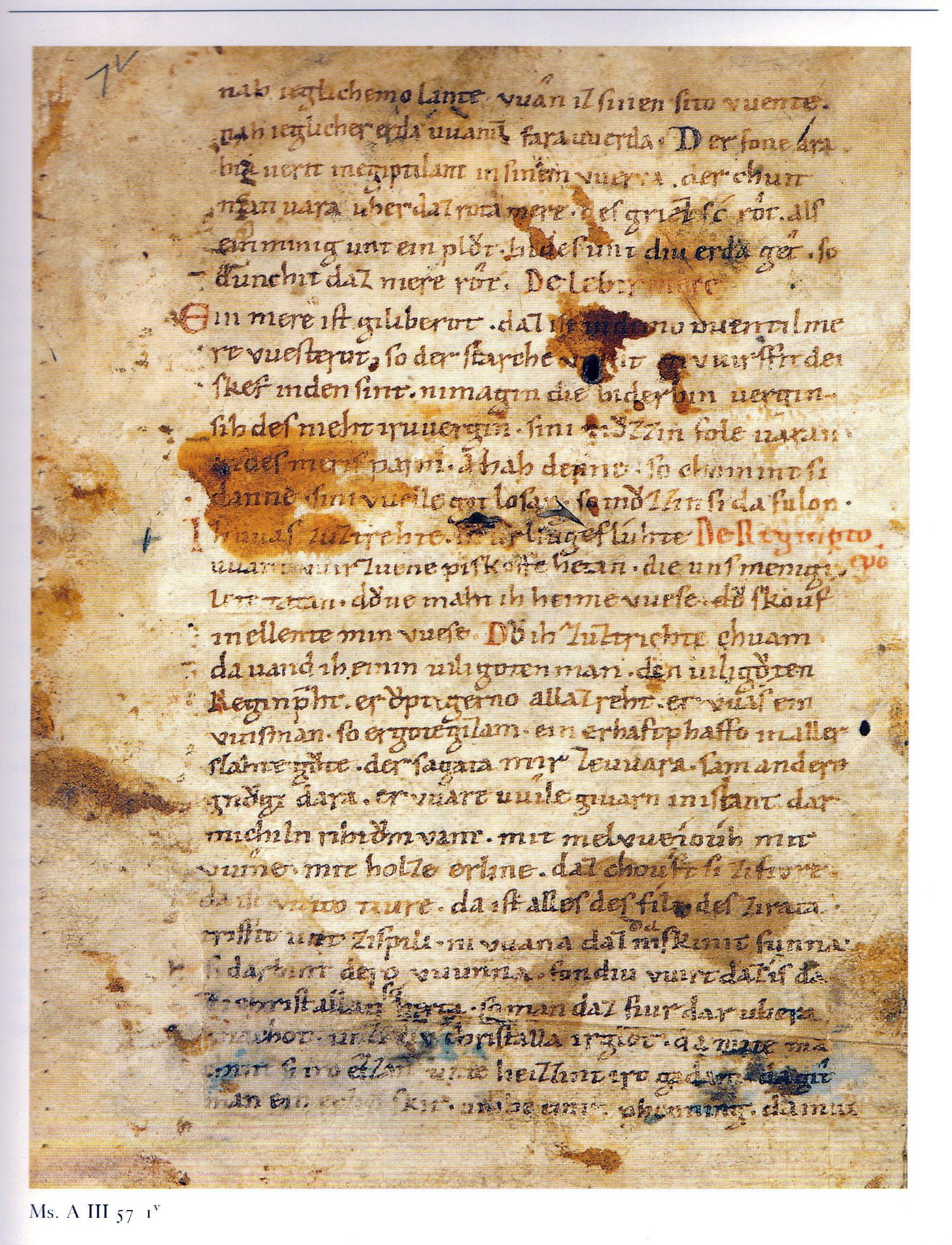 Badische LB Karlsruhe Cod. Donaueschingen A III 57, Bl. 1v